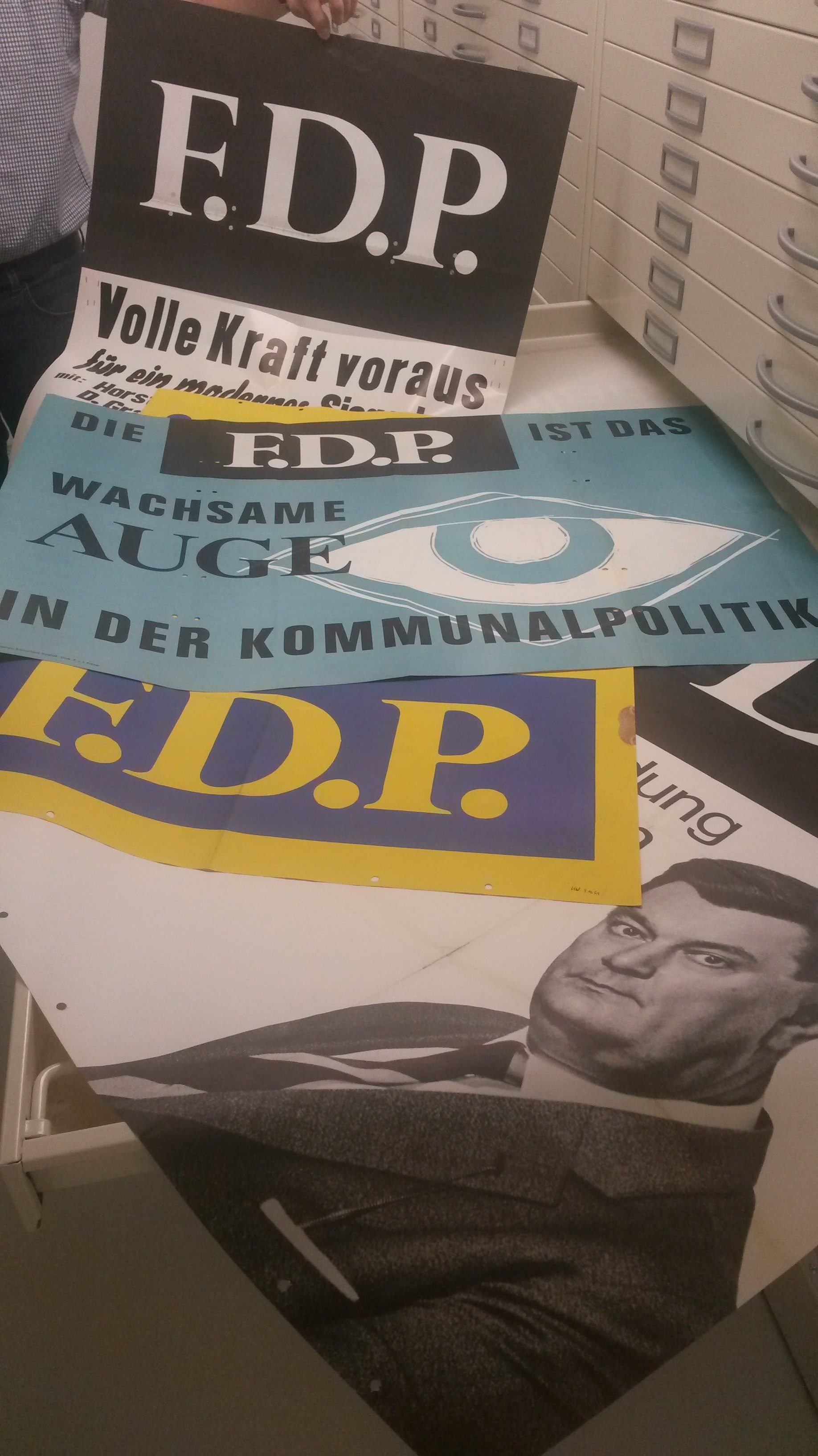 Plakate